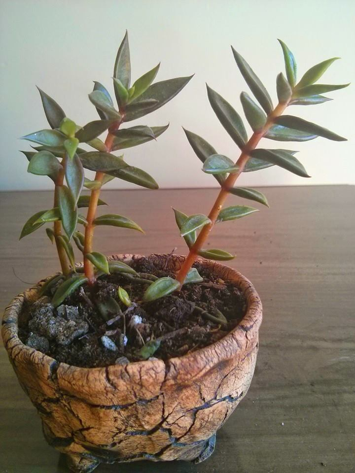 Una de las nueve especies de plantas Lenophyllum con flores perteneciente a la familia Crassulaceae.